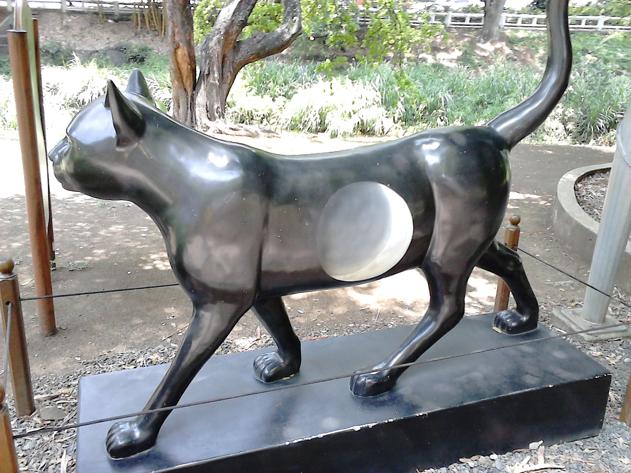 Gata "Entrañable"